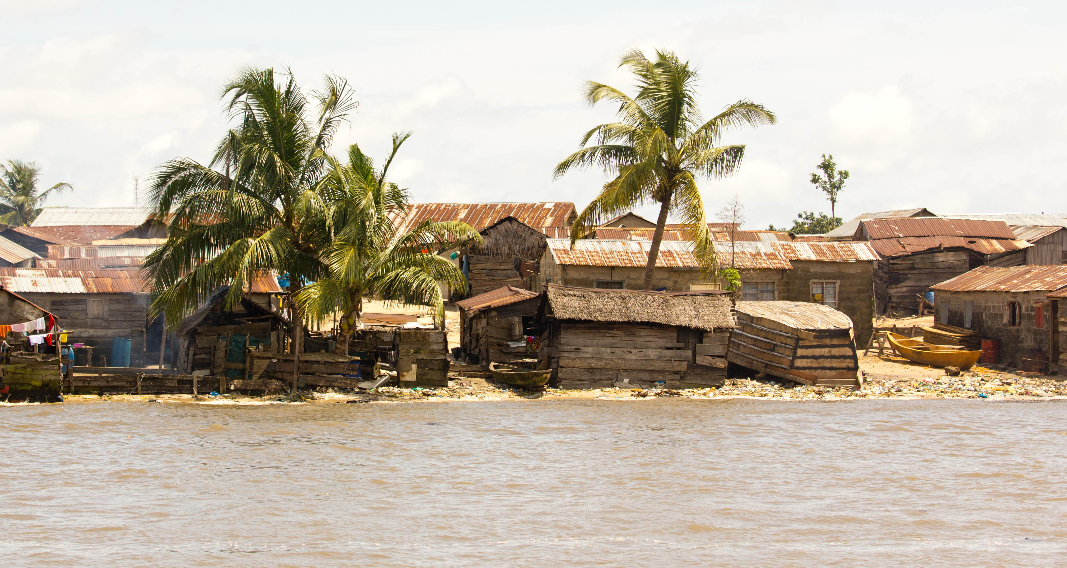 Lagos